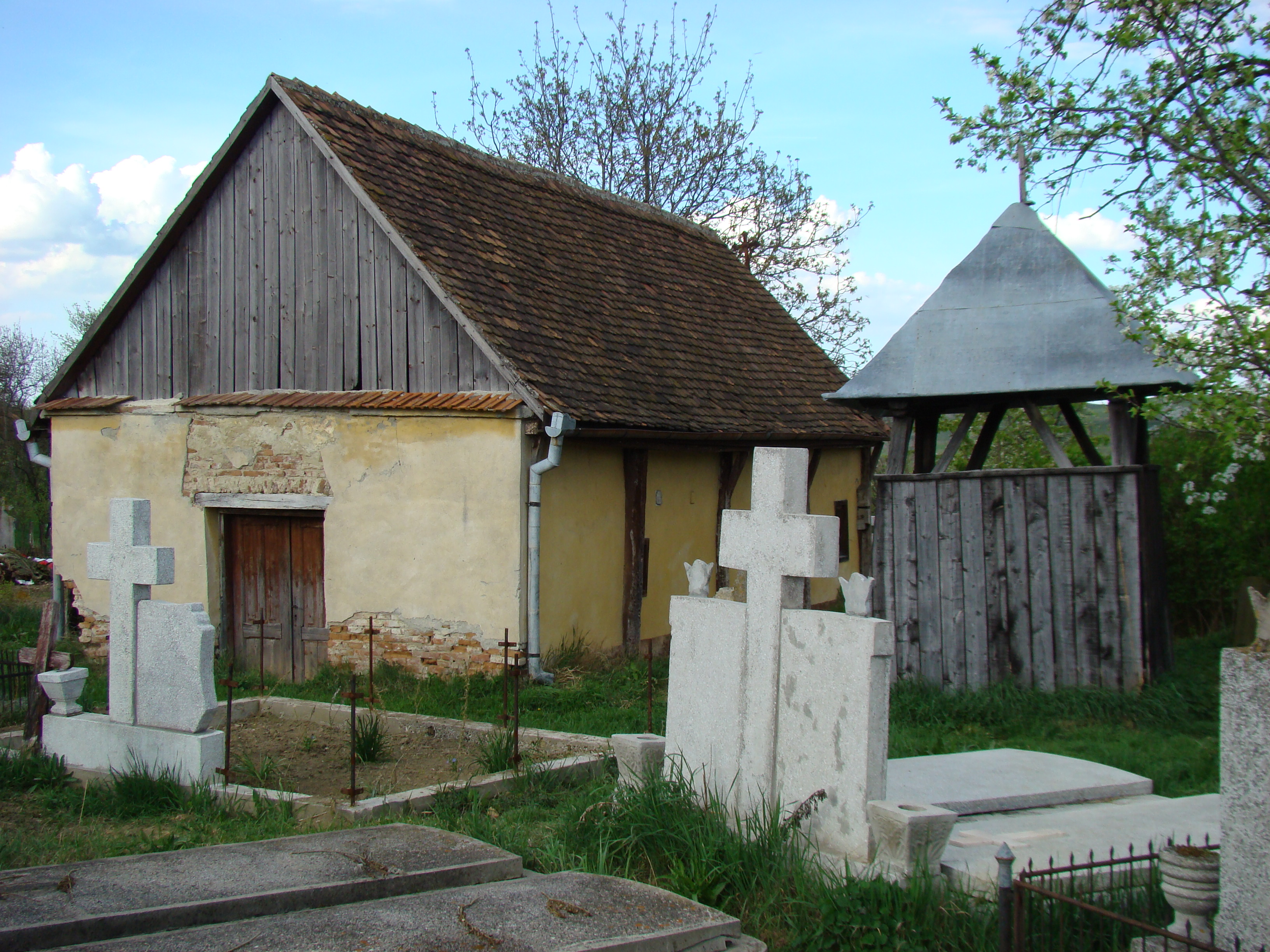 Biserica de lemn din Presaca